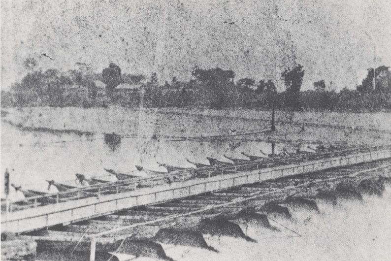 明治7年頃の長良川にかかる明七橋（初代の長良橋）。岐阜市